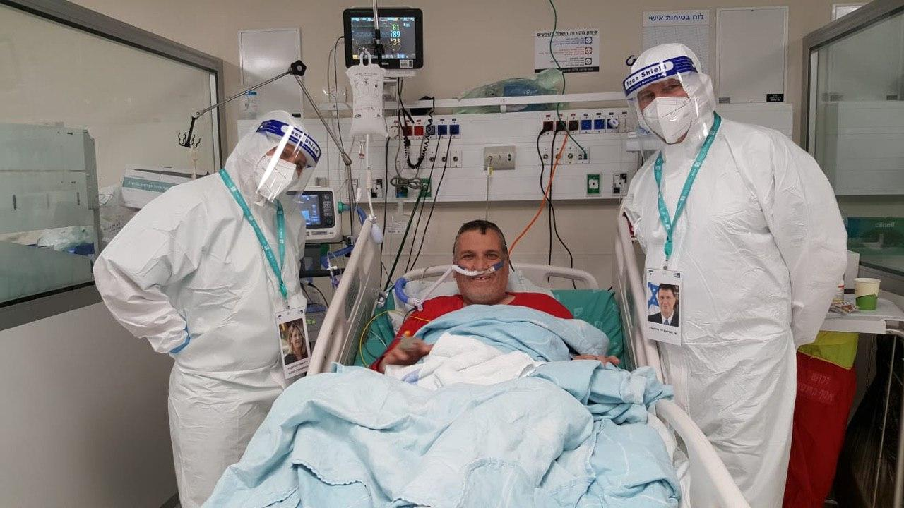 שר הבריאות יולי אדלשטיין מבקר חולה קורונה באסף הרופא